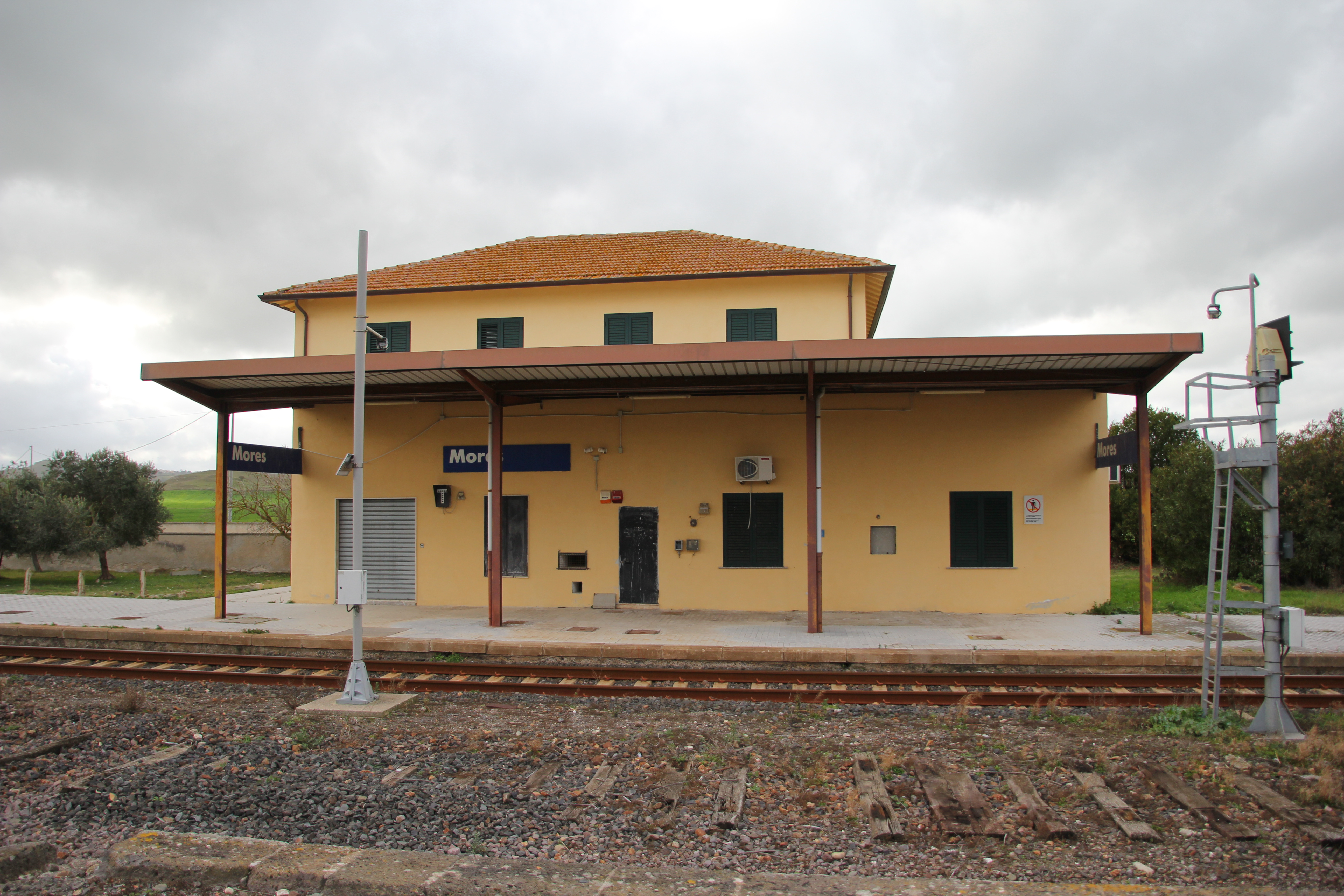 Mores - Stazione ferroviaria